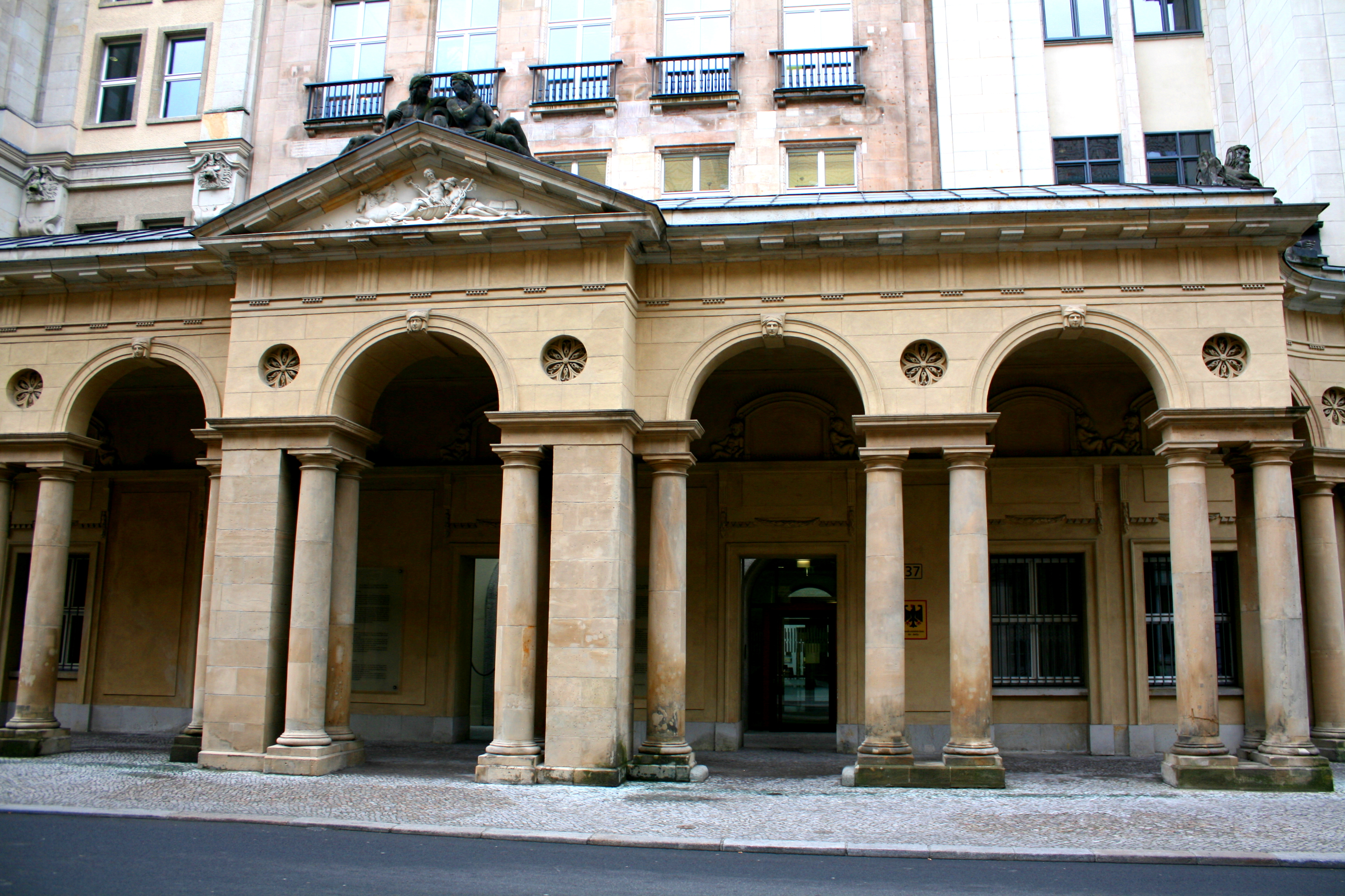 Hauptsitz des Bundesministeriums der Justiz in Berlin, Eingangsbereich